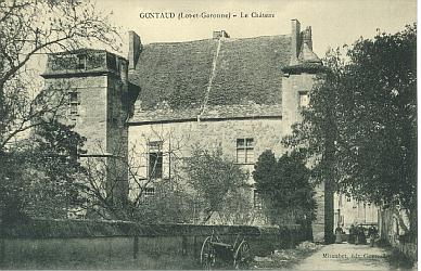 chateau de gontaud.jpg